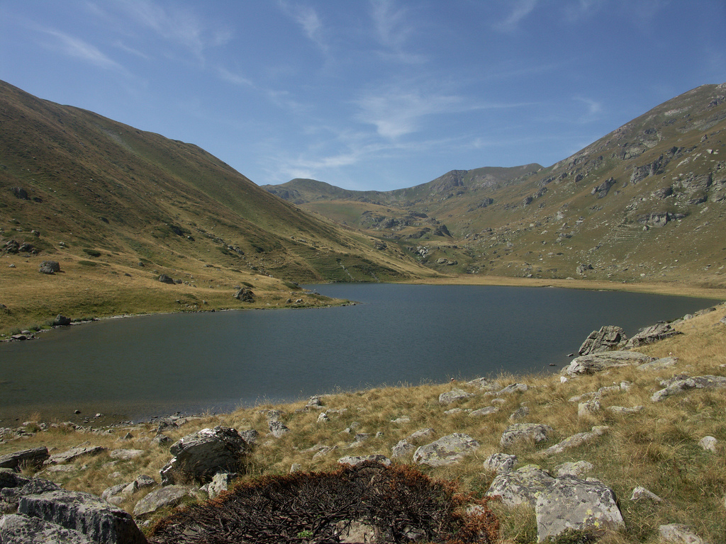 Боговињско езеро на Шар Планина